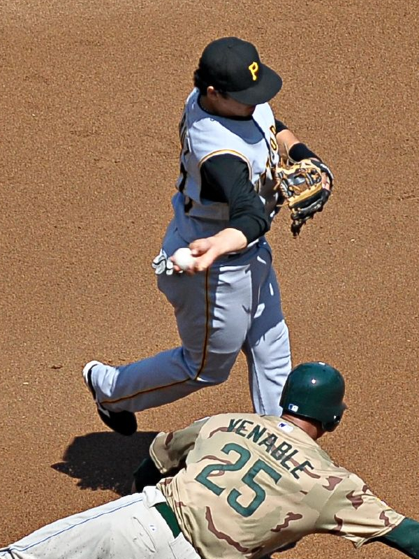 Luis Cruz